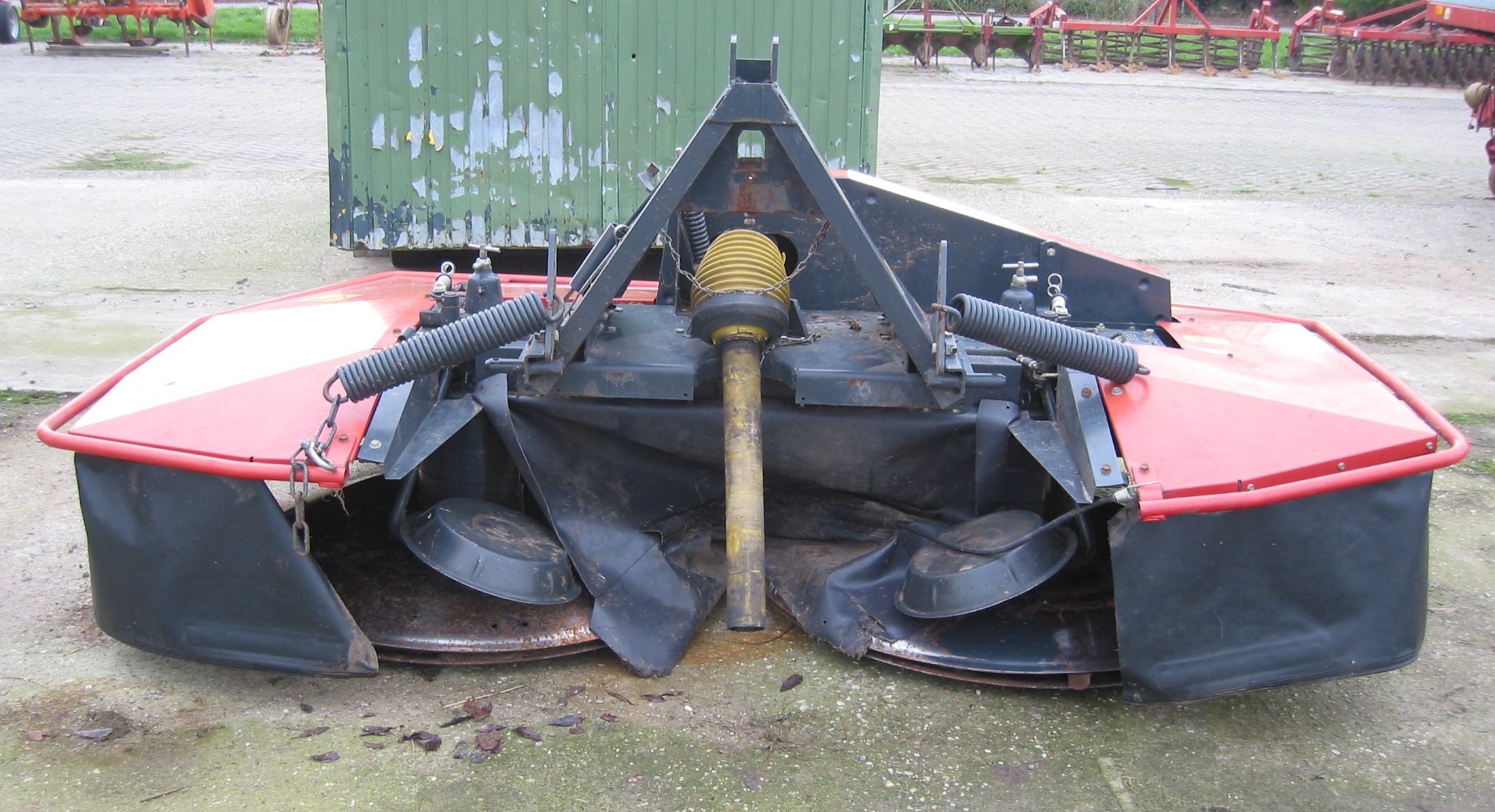 Trommelmähwerk für den Frontanbau mit gut sichtbarem Gerätedreieck (Gegenstück zum Schnellkuppeldreieck) und Gelenkwelle (gelb)